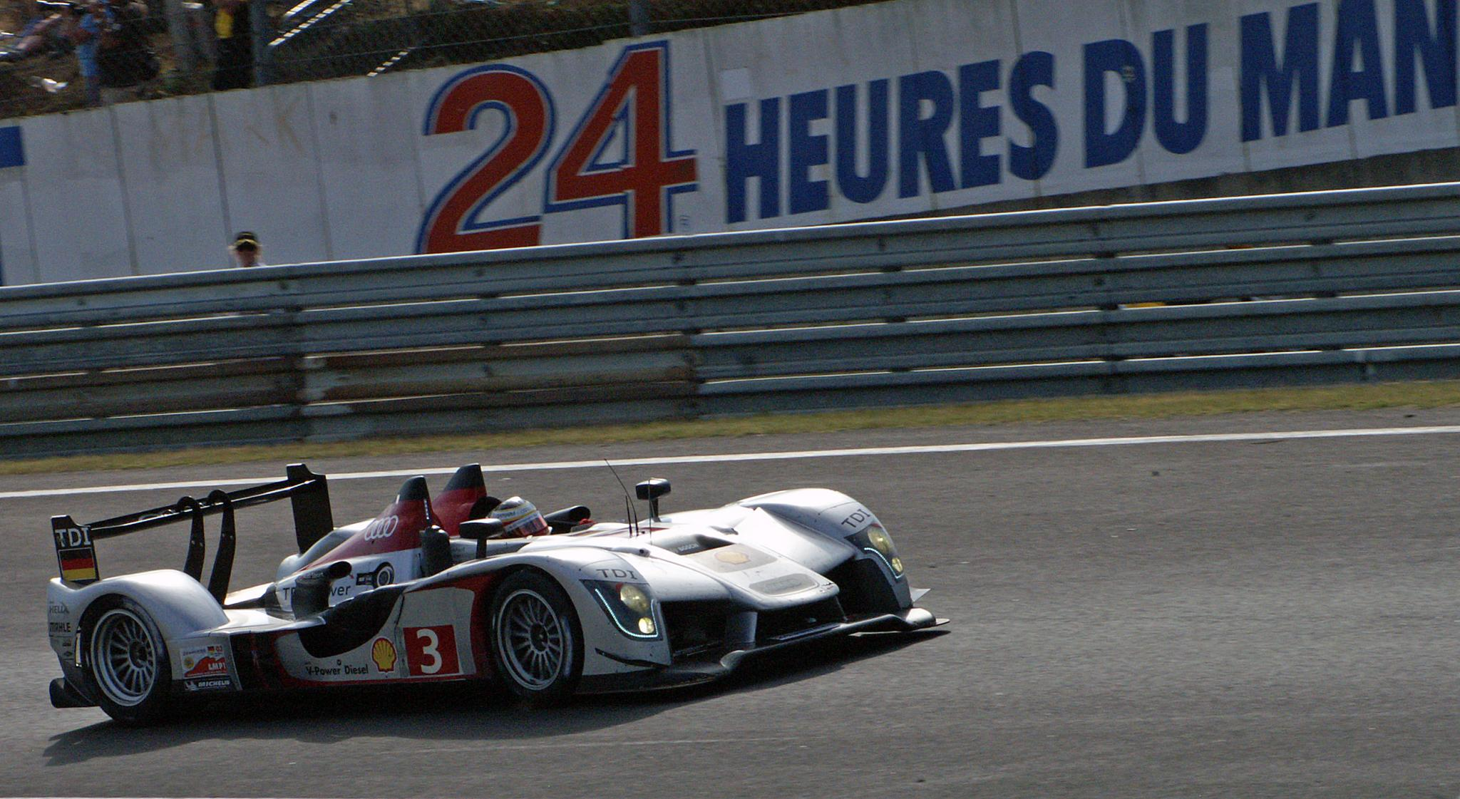 Audi R15 TDI aux 24 heures du Mans 2009